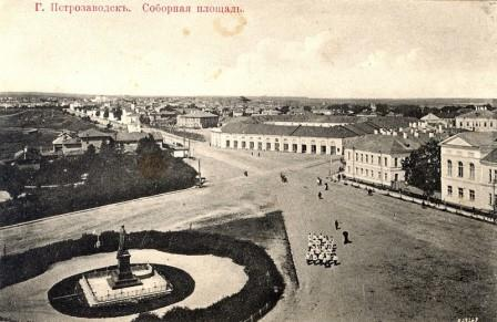 Петрозаводск. Соборная площадь.(1904)